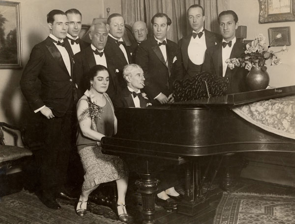 Soirée donnée par Éva Gauthier pour l'anniversaire de Maurice Ravel, le 7 mars 1928. Assis au piano : Éva Gauthier et Ravel; debout, à l'extrême droite : George Gershwin